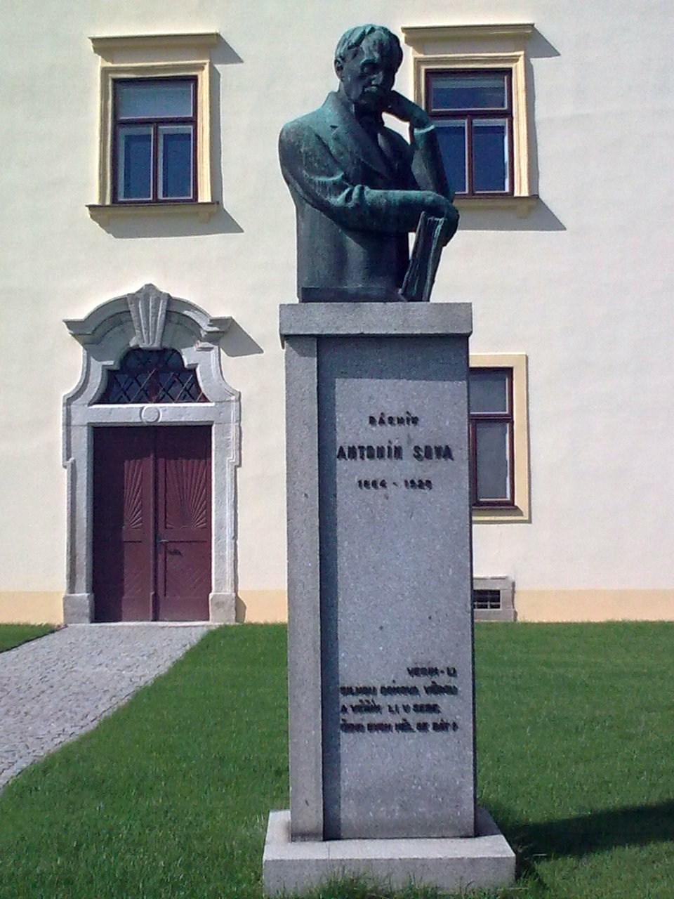 Pomník Antonína Sovy (Pacov), při zámku v Pacově. Antonín Sova (26. února 1864 Pacov – 16. srpna 1928 Pacov) byl český básník a prozaik. Jeho přírodní lyrika je spojena s jihočeským krajem. V letech 1898–1920 byl ředitelem pražské městské knihovny.